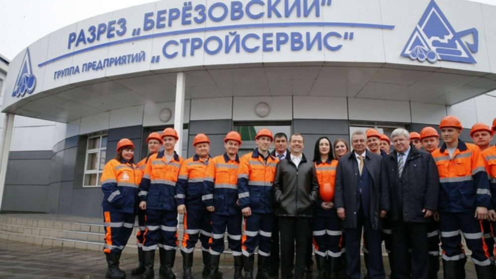 Дмитрий Медведев на Березовском разрезе